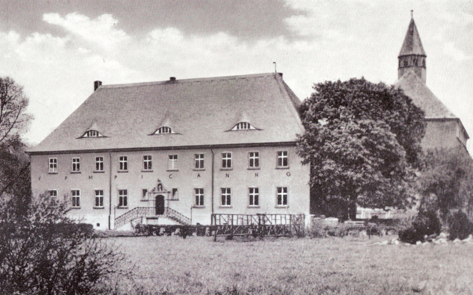 Gut Himmelpforten